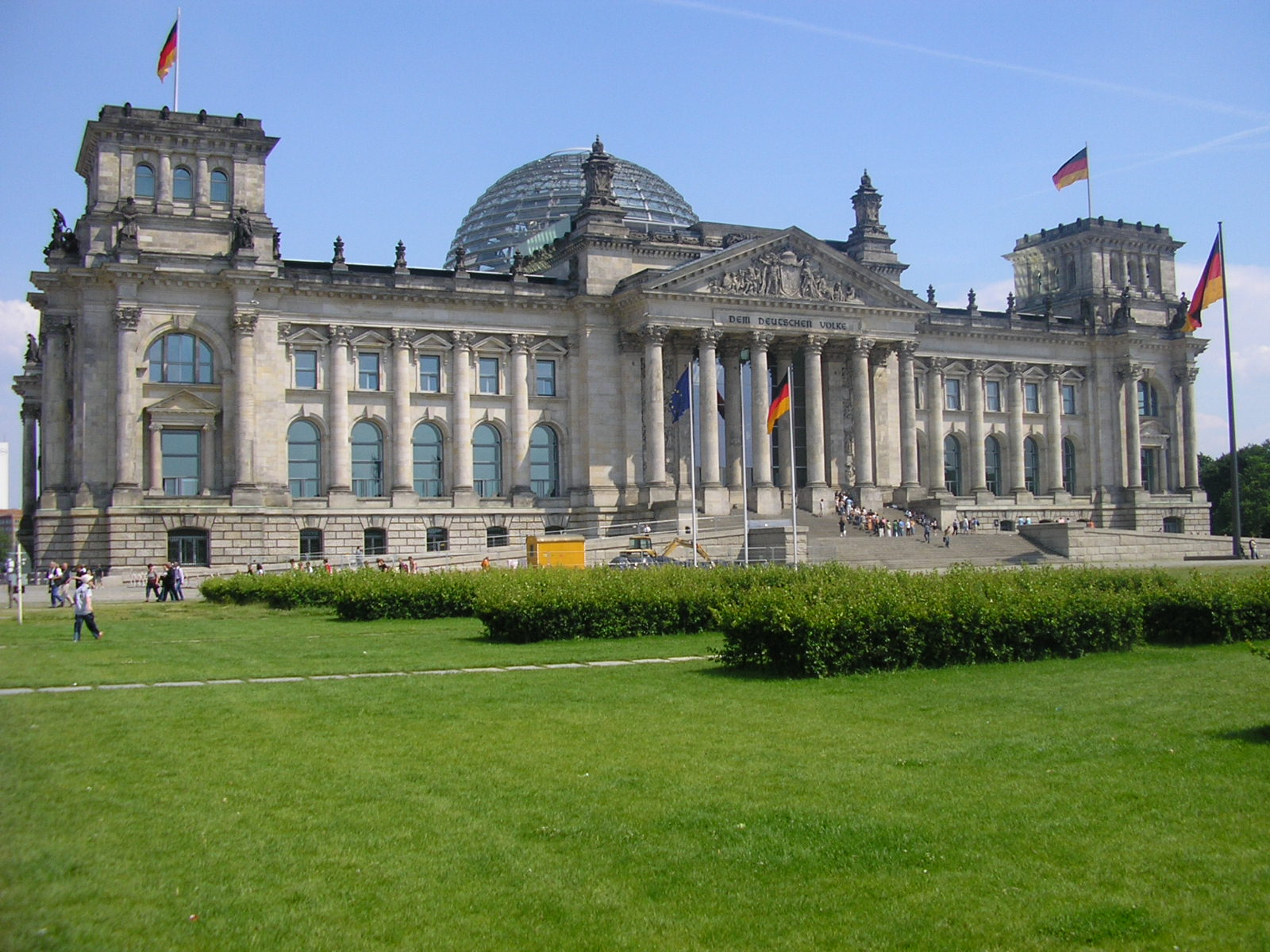 Reichstag, Berlin, Germany